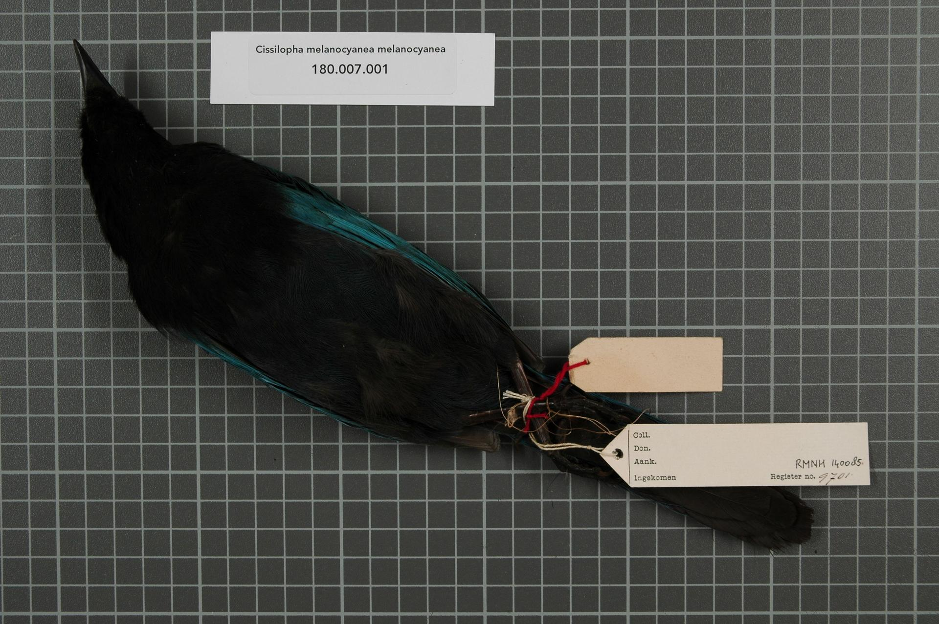 Cissilopha melanocyanea melanocyanea (Hartlaub, 1844)